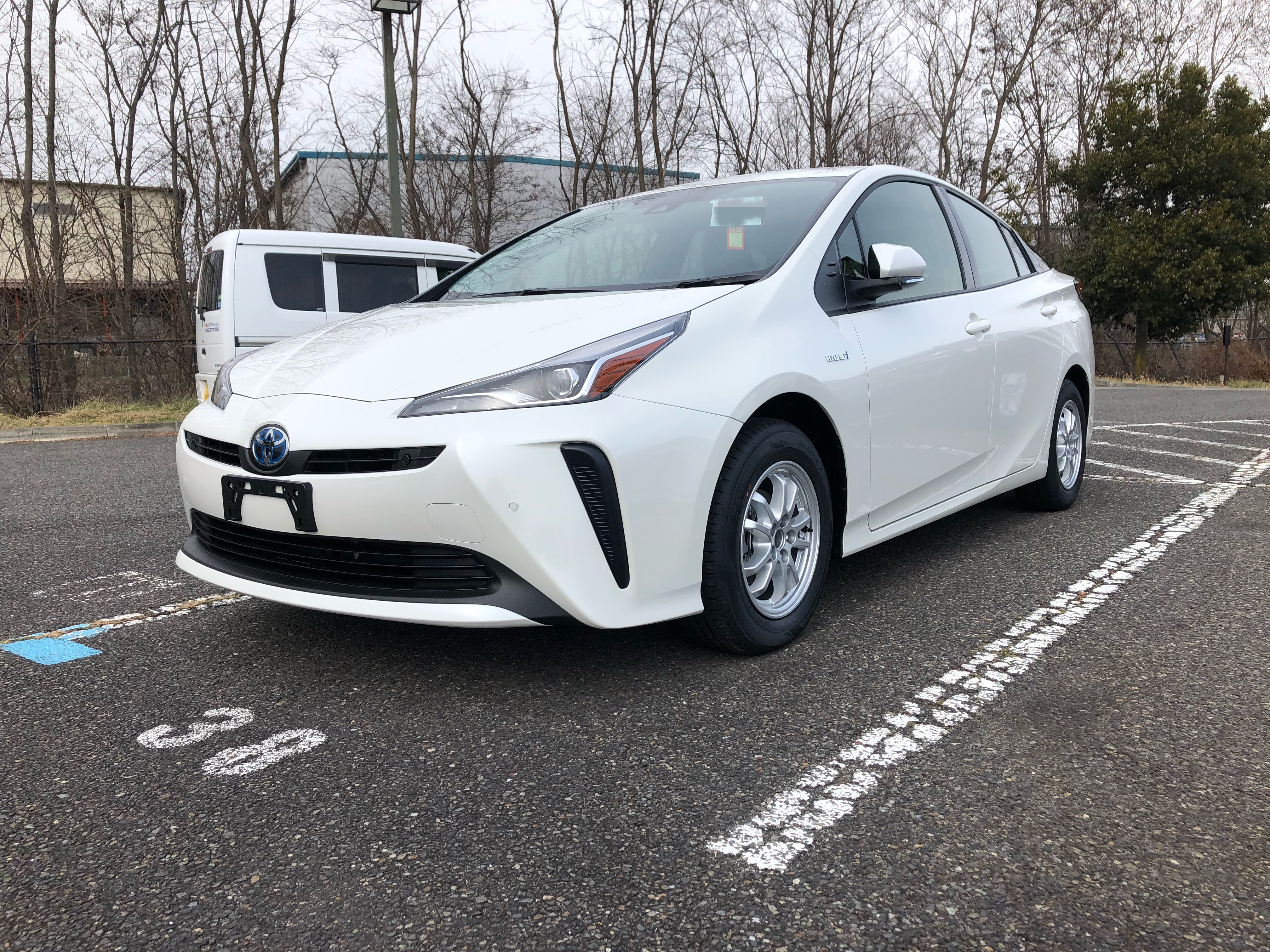 2018年12月改良型プリウスをフロントより撮影。（一部モザイク処理）